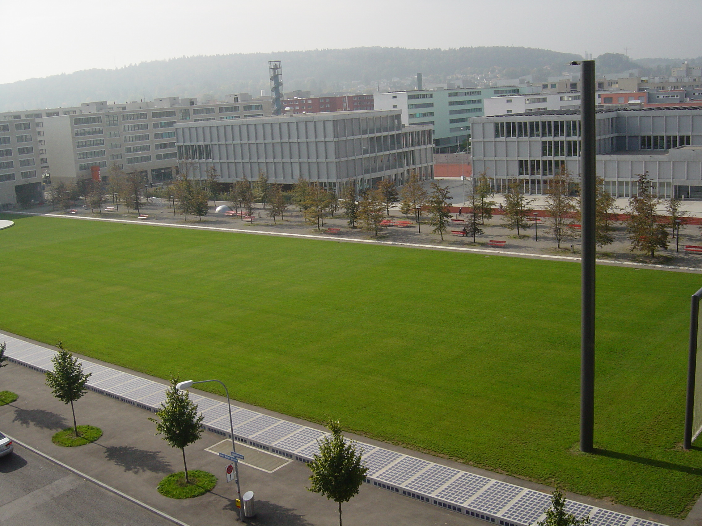 Blick von oben auf die Spielwiese. Auf der rechten Seite ist massive Lichtmast zu sehen.